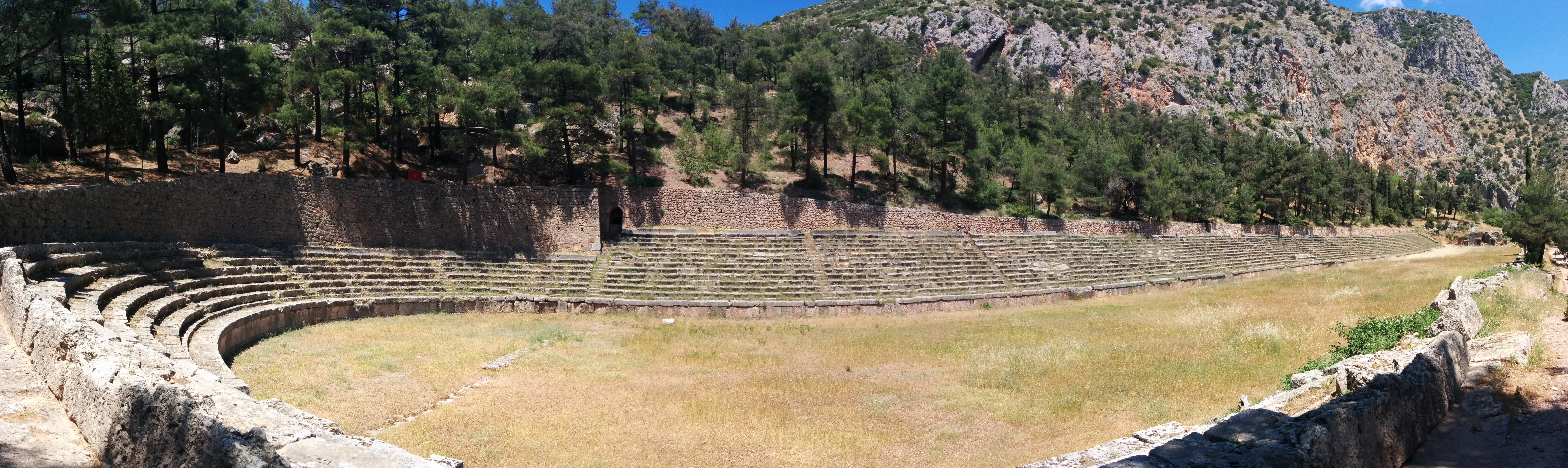 Stade de Delphes en Grèce.